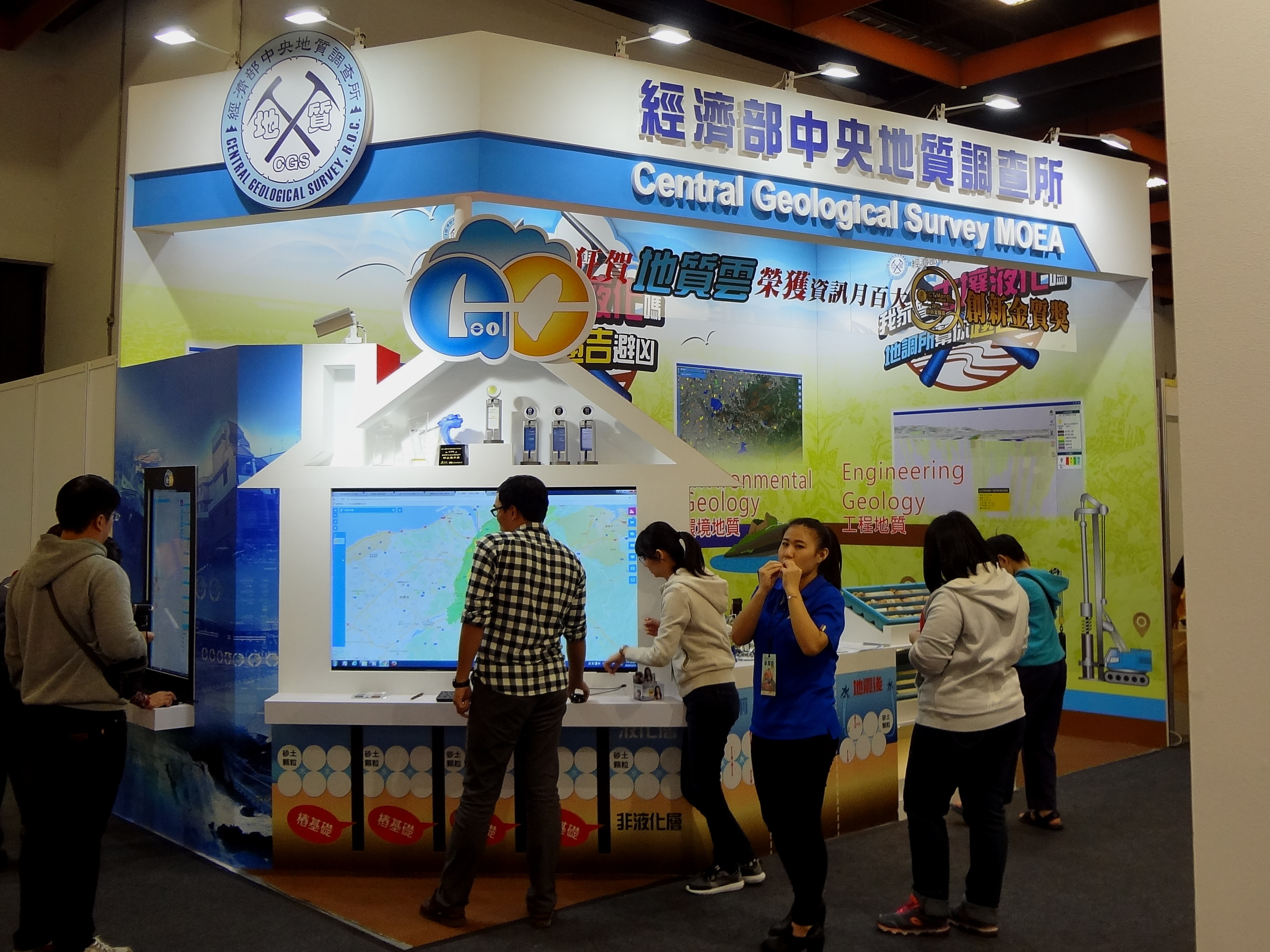 2016年台北資訊月，中華民國經濟部中央地質調查所攤位。